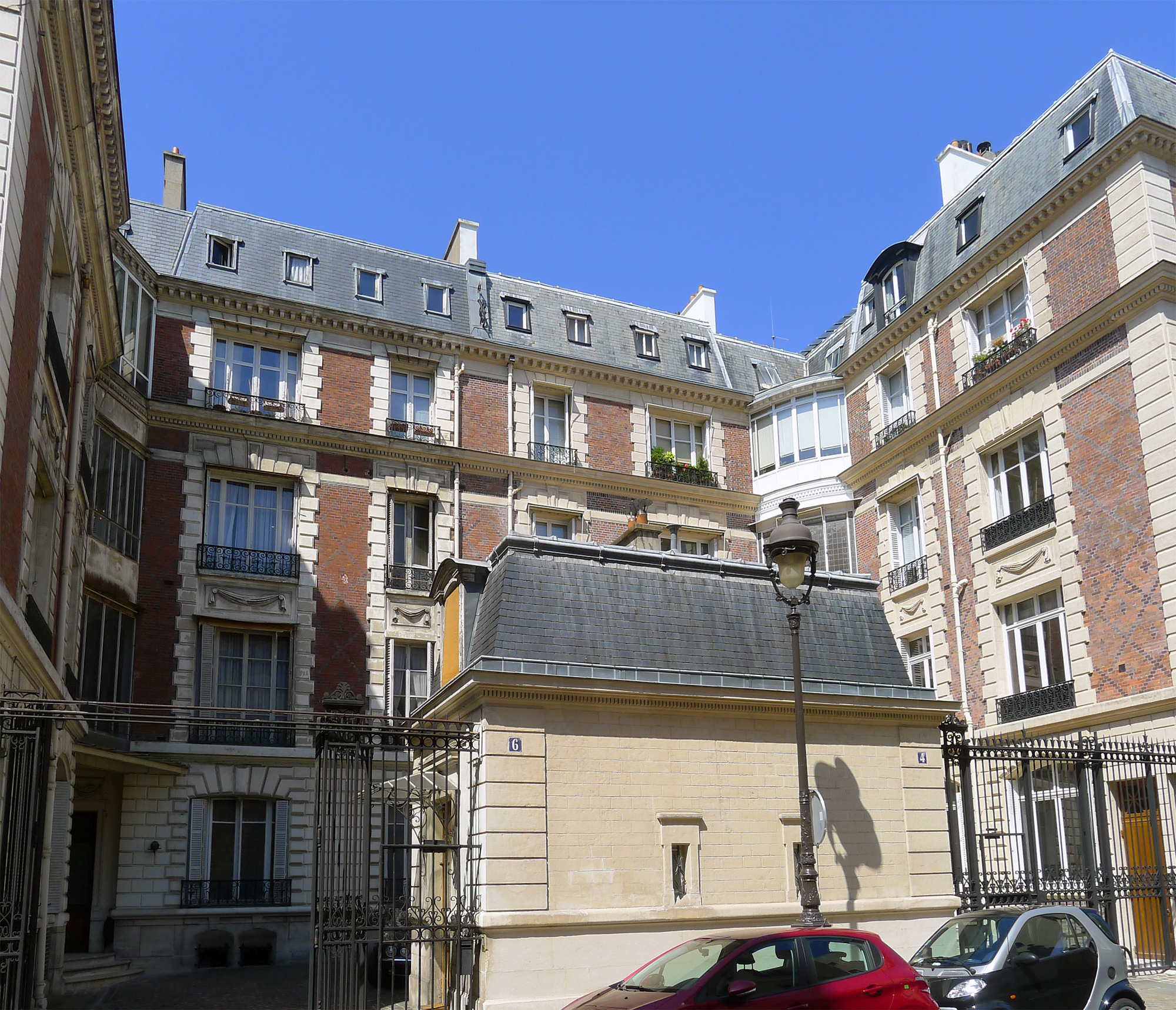 Rue Murillo (n° 4 et 6) - Paris VIII